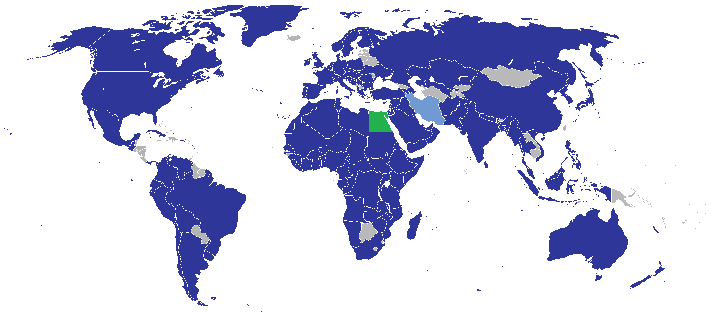 البعثات المصرية الدبلوماسية في الخارج، بحسب وزارة الخارجية المصرية. مصر. الدول التي تقيم مصر معها علاقات دبلوماسية كاملة. الدول التي ترعى فيها مصر مصالحها. تمثيل دبلوماسي غير مُقيم.